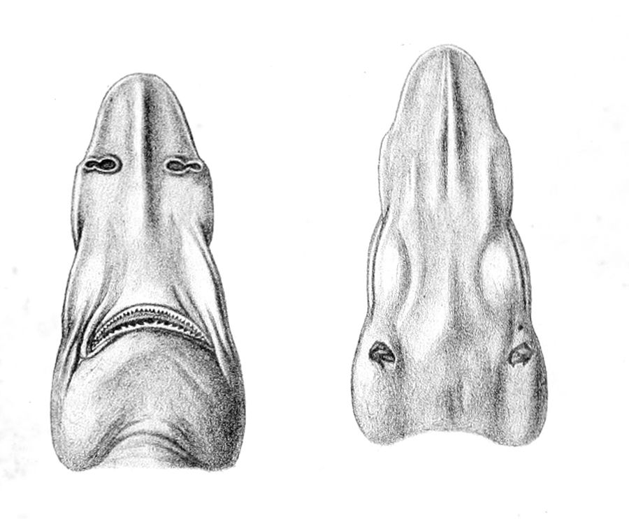 Deania calcea rostrus